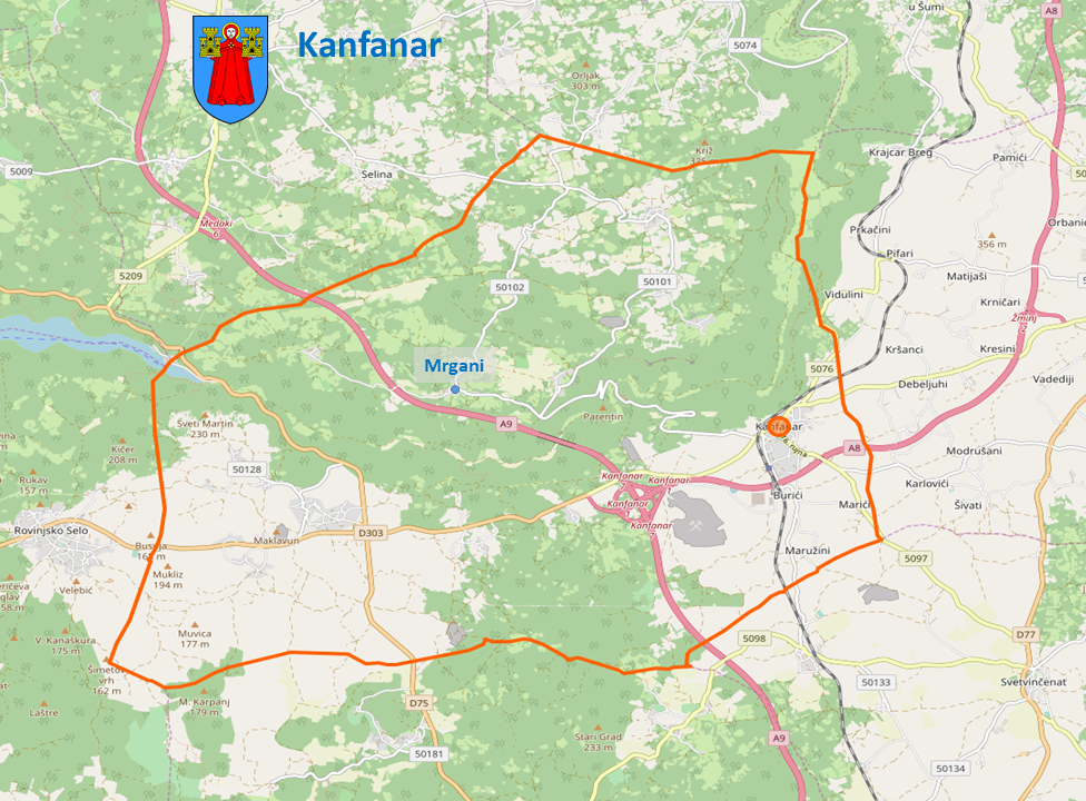 Kroatien (HR) - Gespanschaft Istrien (036) - Gemeinde Kanfanar - Ortsteil Mrgani: Lage im Gemeindegebiet